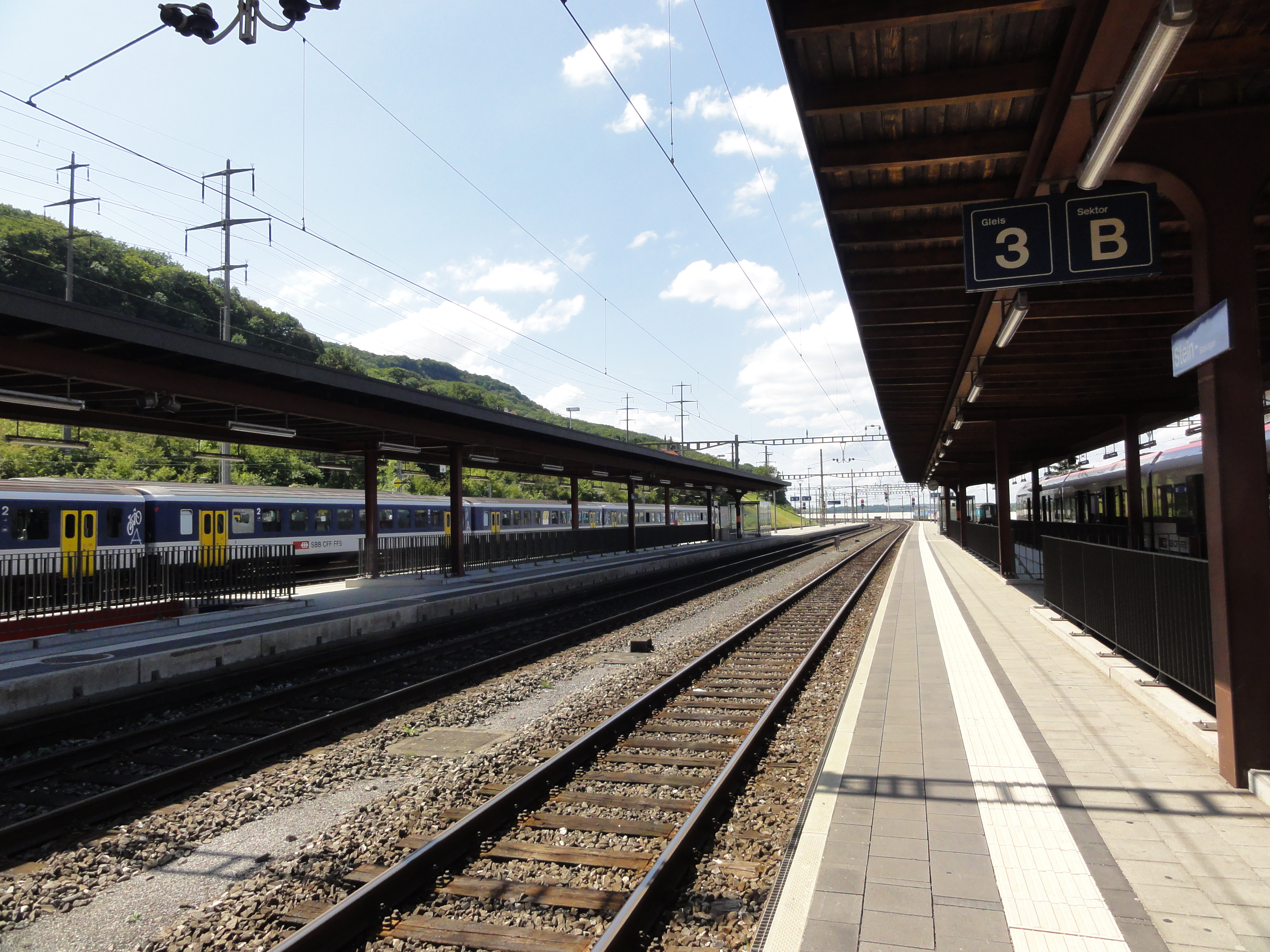 Stein, Aargau — Bahnhof Stein-Säckingen, Bahnsteige. Blick in Richtung Rheinfelden Info GPS data may be inaccurate. EXIF data regarding date and time may be inaccurate.